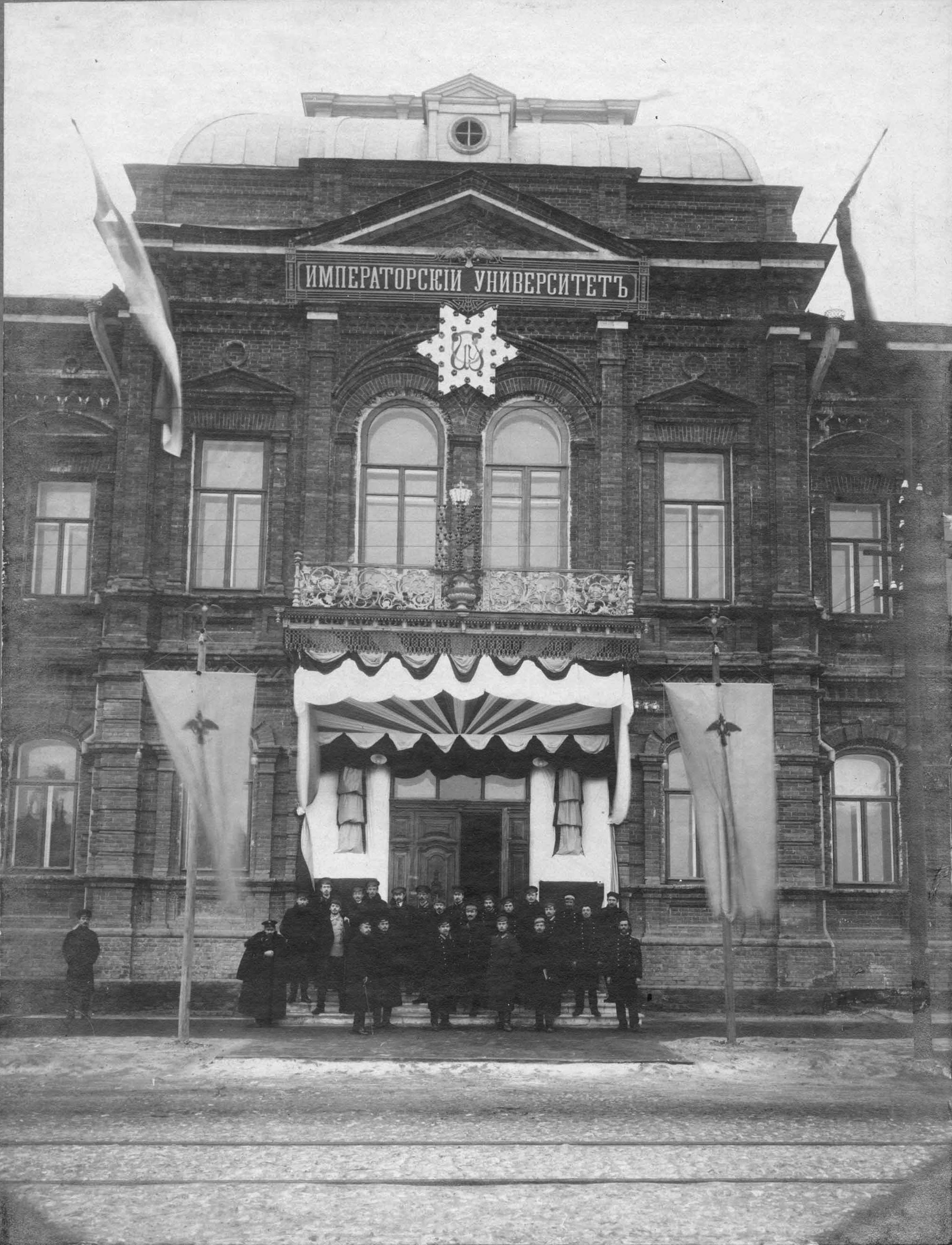 ГАПОУ СО Саратовский областной базовый медицинский колледж